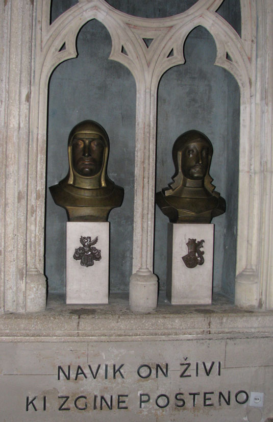 Spomenik hrvatskih knezova Petra Zrinskog i Frana Krste Frankopana u Zagrebačkoj katedrali, koji su 30. travnja 1671. pogubljeni u Bečkom Novom Mjestu.